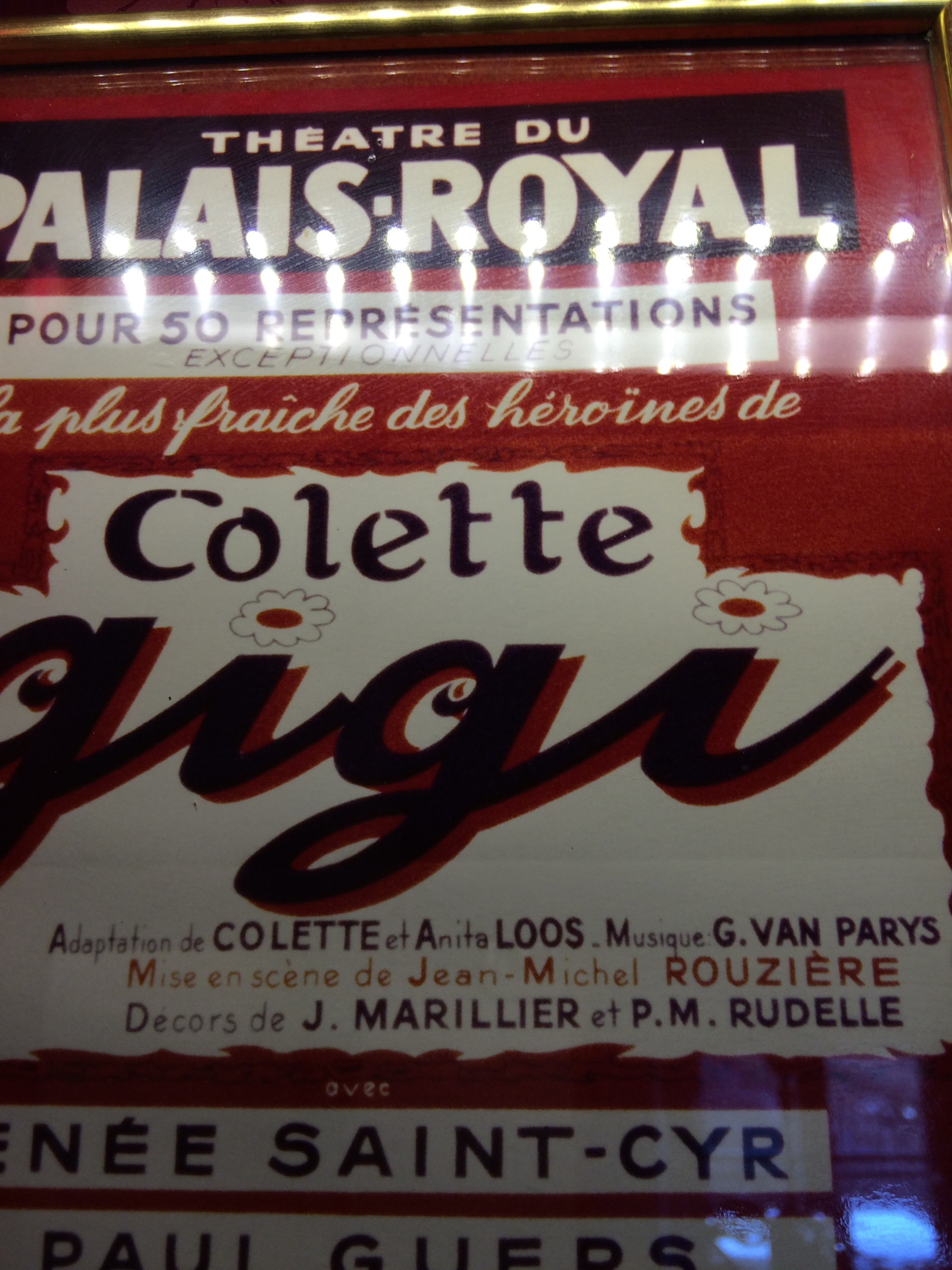 Affichette du théâtre du palais Royal